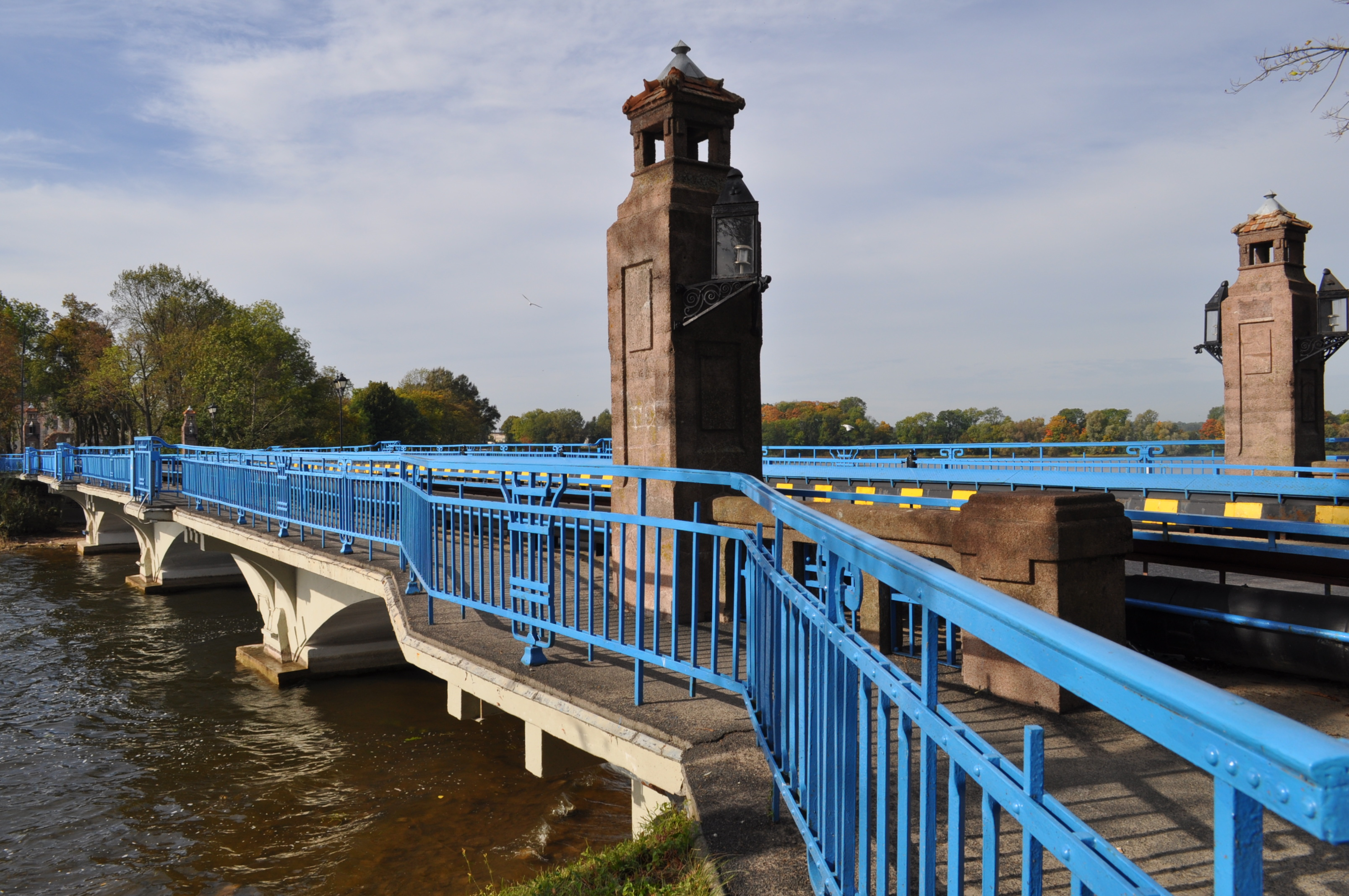 Zabytkowy most łączący wyspę zamkową z resztą miasta.